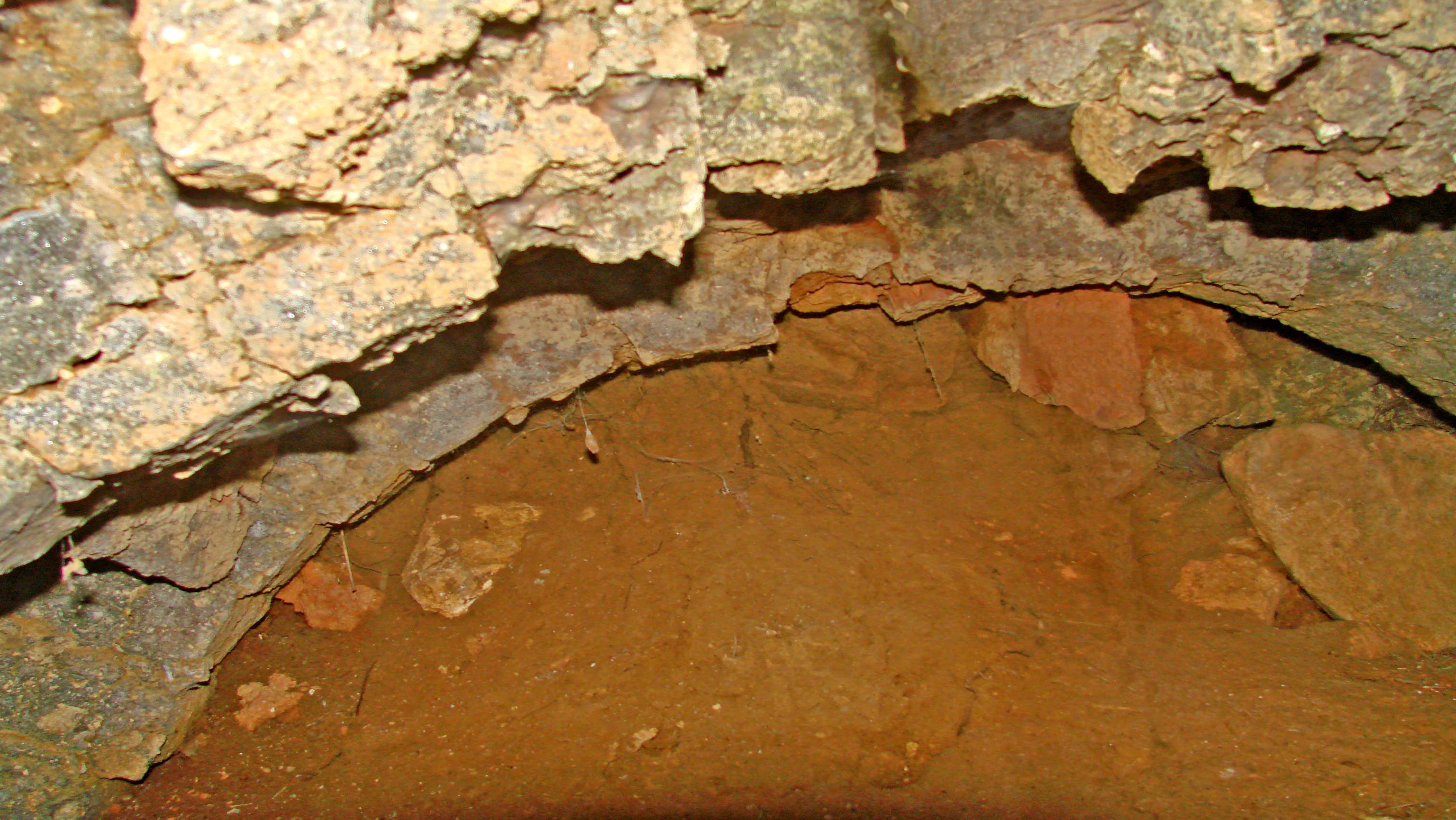 Αρχαίος κεραμικός κλίβανος κλασικής περιόδου, στη δυτική όχθη του ρέματος κάτω από τον λόφο του Γκραντίστ. Ανασκαφές 1993-95